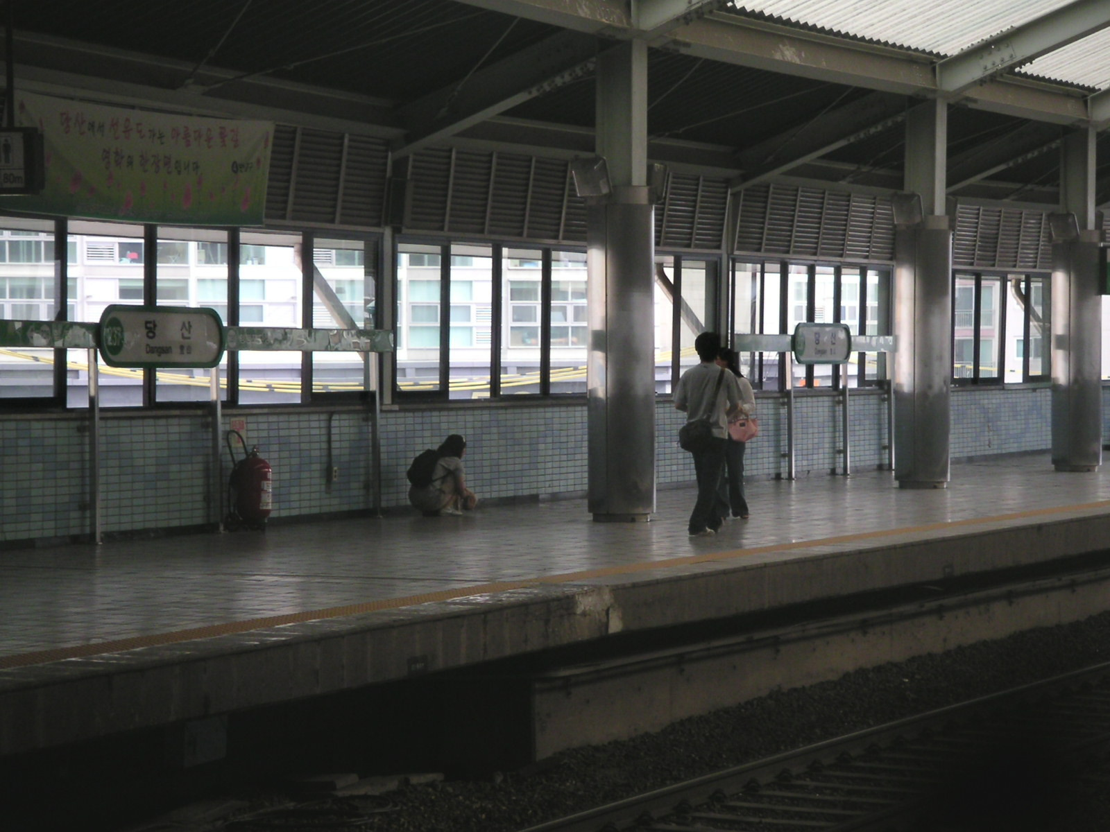 당산역 (Dangsan Station)